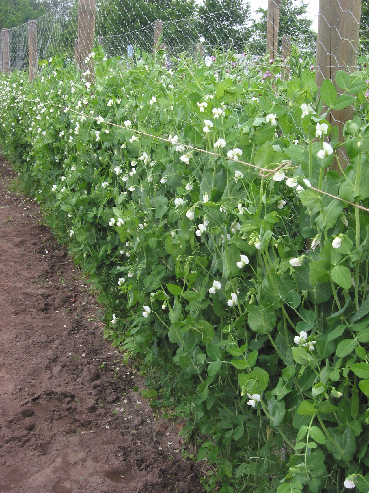 (Peultjes planten) Pisum sativum mange-tout